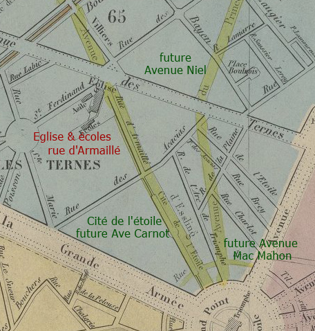 Rue d'Armaillé entre Etoile et Ave des Ternes extrait commenté de Plan géométral de Paris et de ses agrandissements à l'échelle d'un millimètre pour 10 m. 1 : 10 000 / Gravé le trait par Piat ; la lettre par P. Rousset ; Revu et mis au courant par Alfred Potiquet E. Andriveau-Goujon (Paris)-1866 Informations détaillées Cartes et plans Bibliothèque nationale de France, département Cartes et plans, GE D-14437 --plan complet sur gallica .bnf.